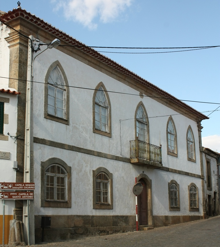 Solar do Barão de Proença-a-Velha (fachada sul)